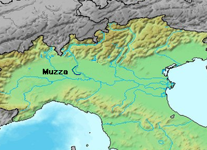 il percorso della Muzza nella pianura Padana